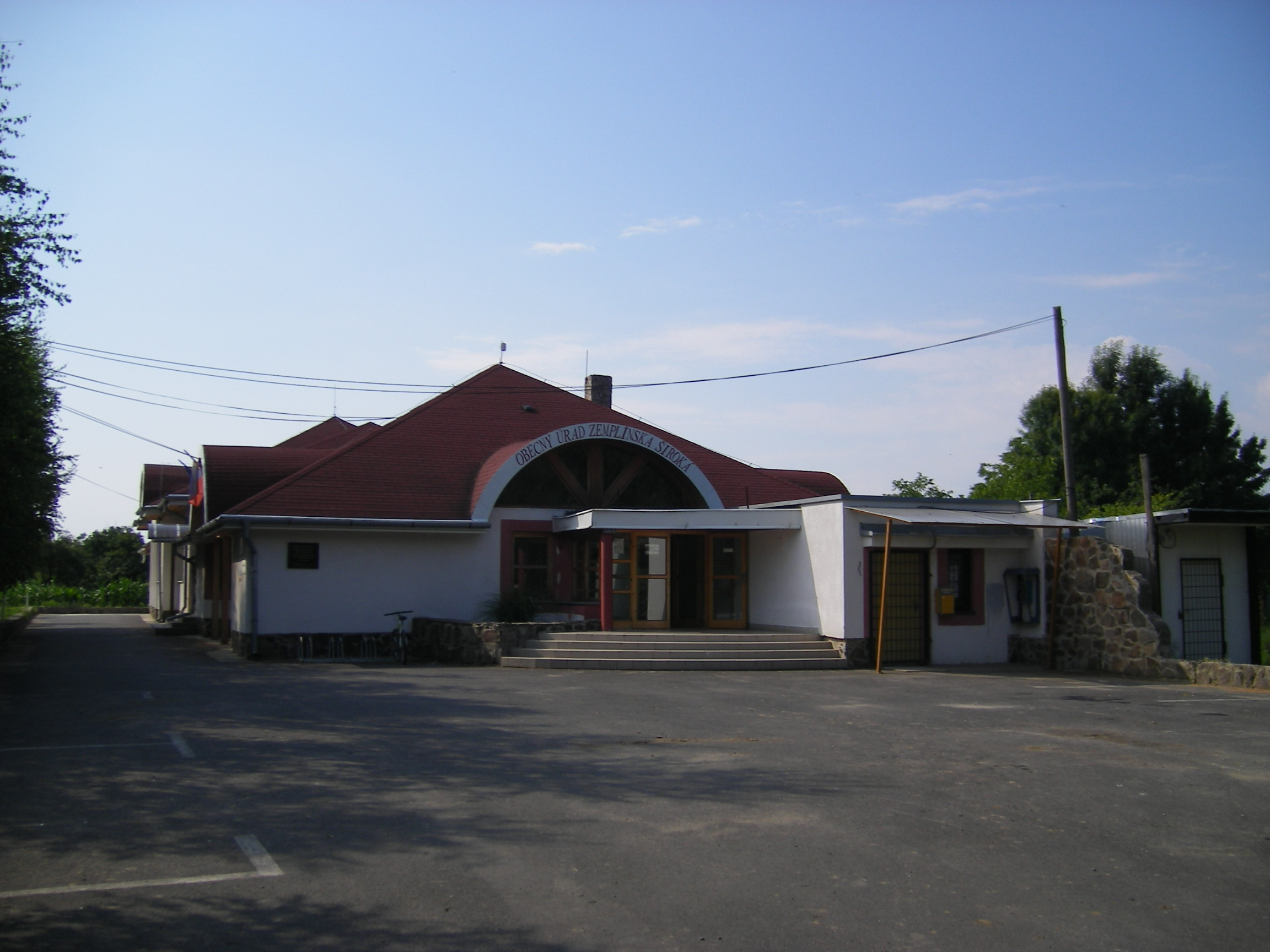 Zemplínska Široká (okres Michalovce), obecný úrad (local administration building)